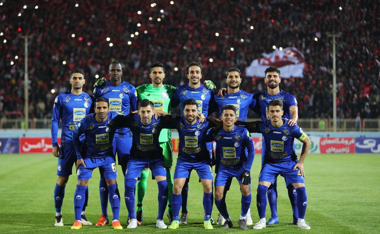 تصاویر دیدار استقلال و تراکتور در ۱۰ آبان ۱۳۹۸ در ورزشگاه یادگار امام تبریز که با هتریک شیخ دیاباته و تک گل علی کریمی استقلال ۴ بار دروازه تیم تبریزی را باز کرد و پیروز دیدار شد. (مشاهده گزارش بازی)